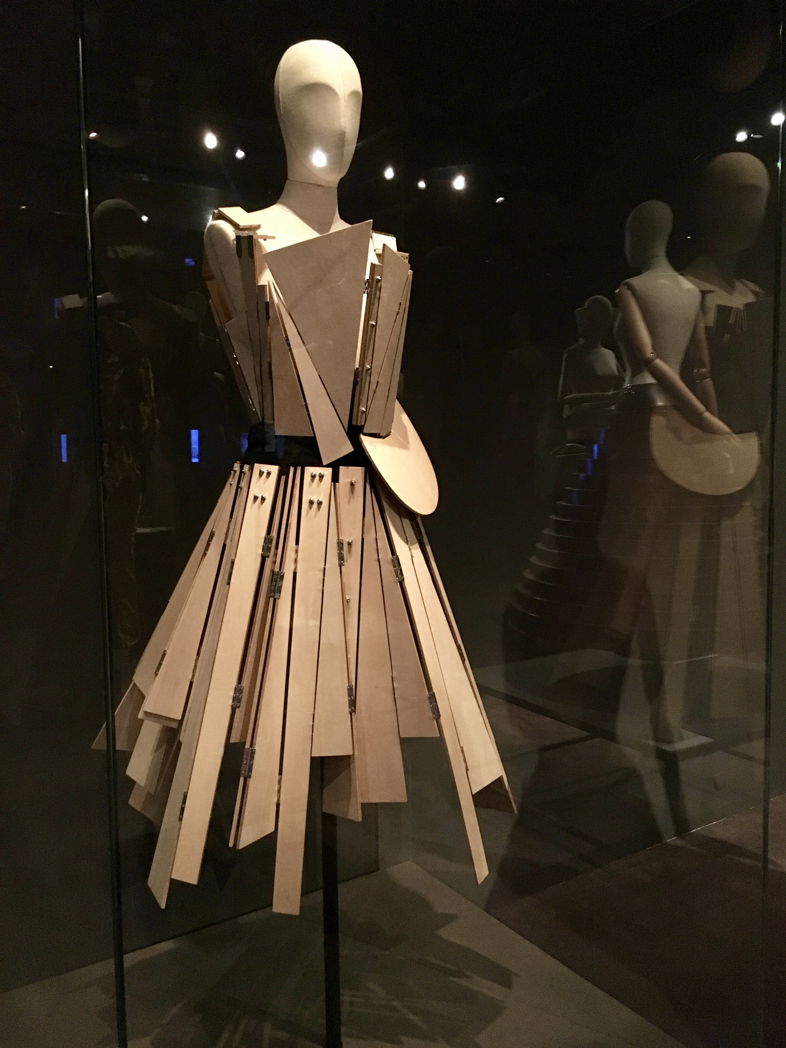 Yohji Yamamoto Top e gonna, collezione autunno e inverno 1991-92. Legno e lana